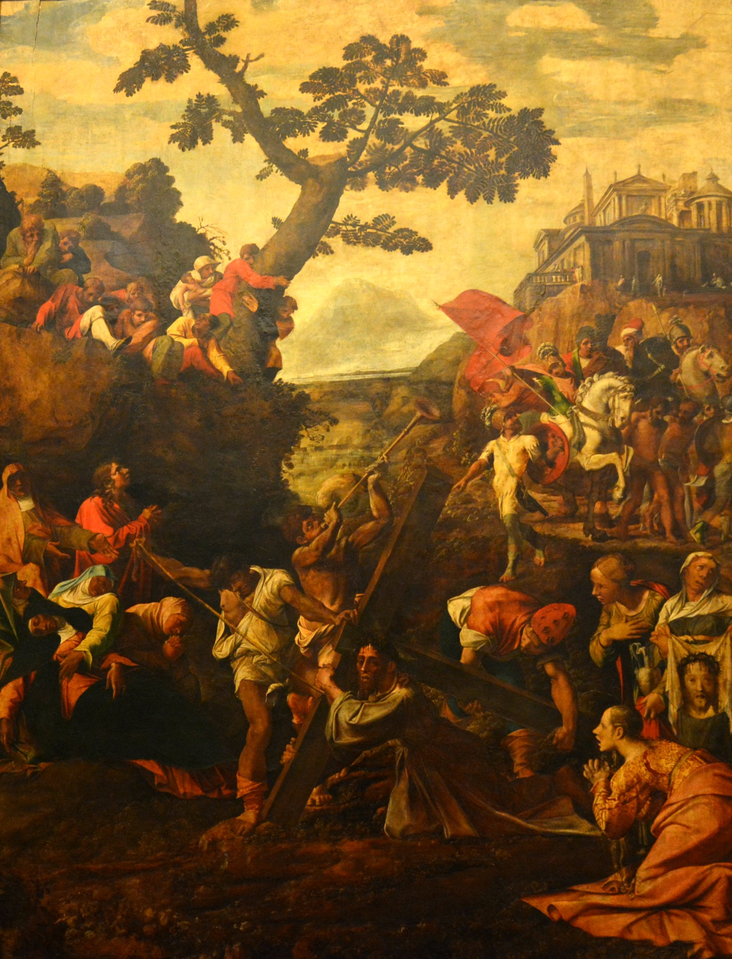 Vedi titolo